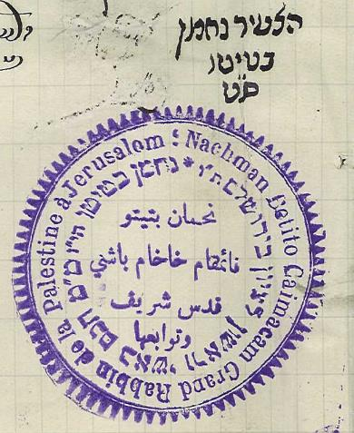 חתימתו וחותמתו הרשמית של הרב נחמן בטיטו, מ"מ הראשון לציון